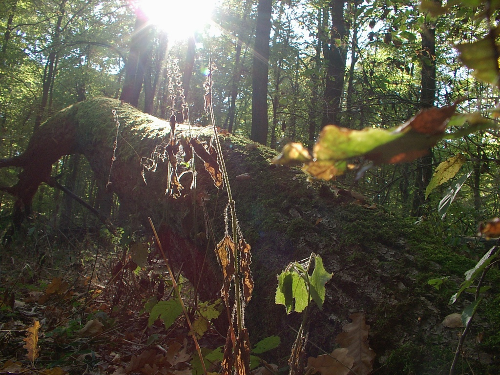 Rezerwat przyrody "Las Łagiewnicki" w Łodzi A nature reserve "Łagiewniki Forest" in Łodź. author: Bogdan Janus, Łódź, Poland